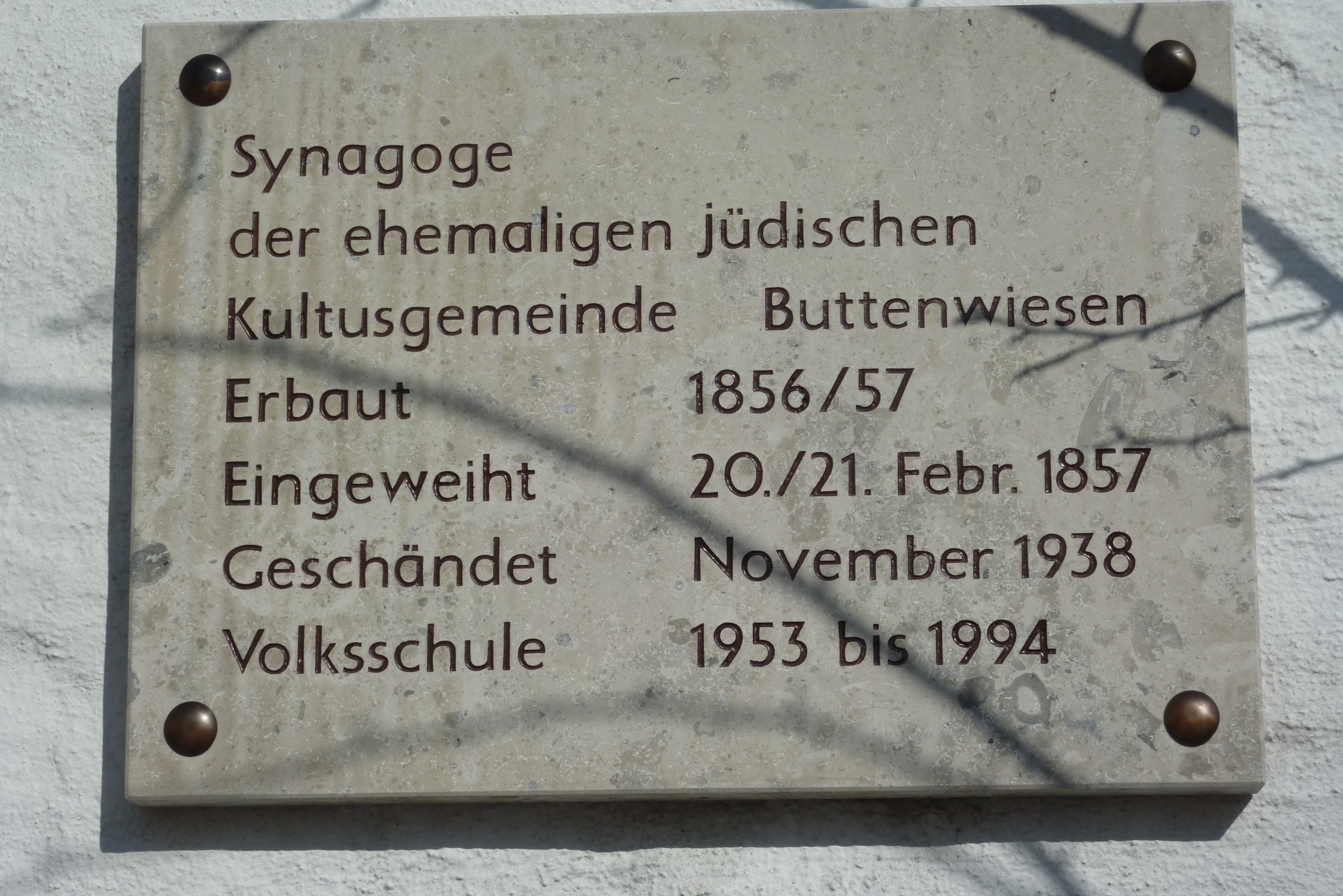 Erklärungstafel an der Synagoge in Buttenwiesen